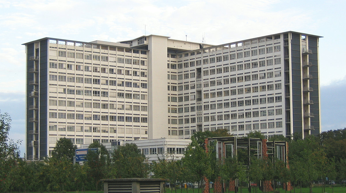 Middelheim hospital in 2020 Antwerp, Belgium august 30, 2006